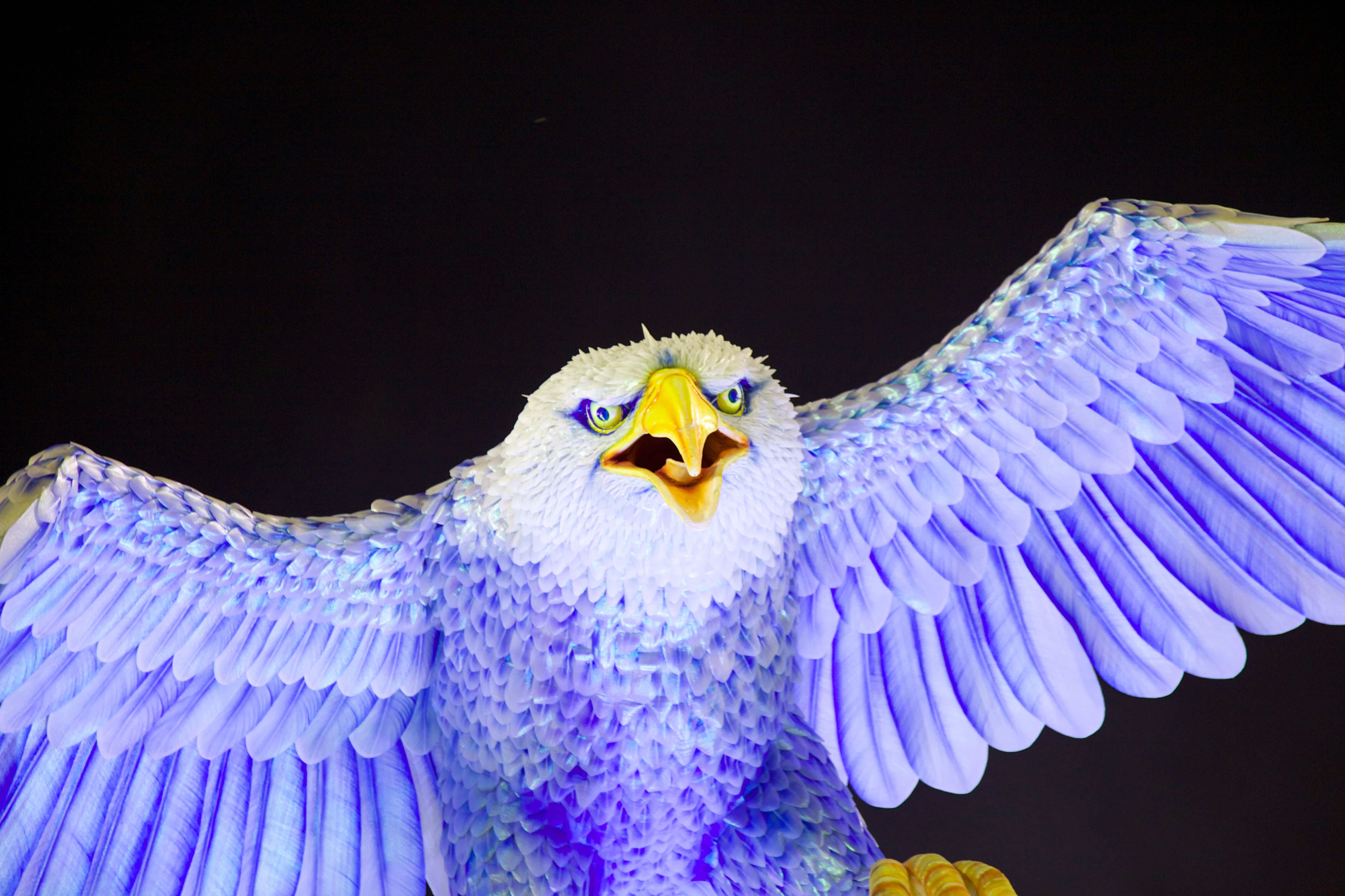 Carnaval 2014 no Sambadrome Marquês de Sapucaí no Rio de Janeiro, Brasil. Escola Portela